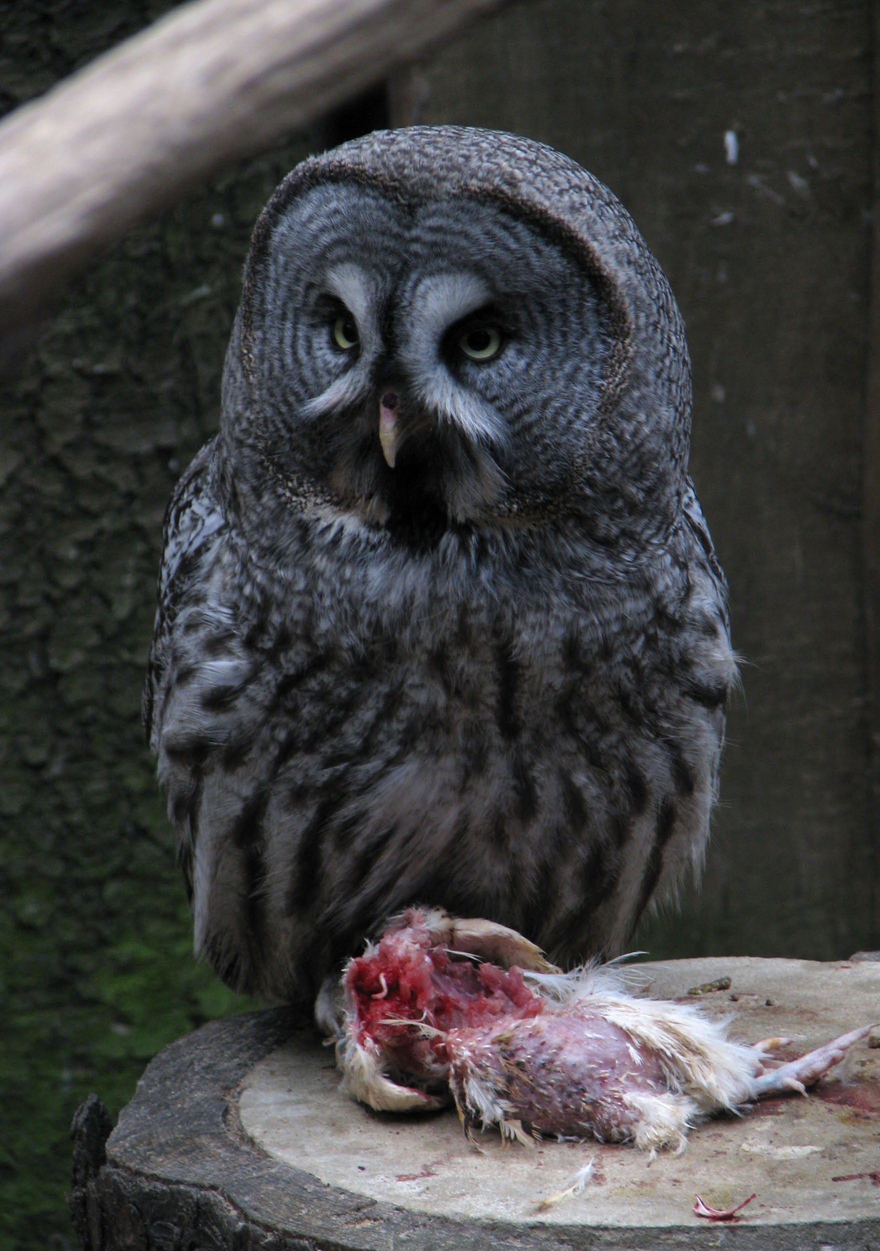 Zoo